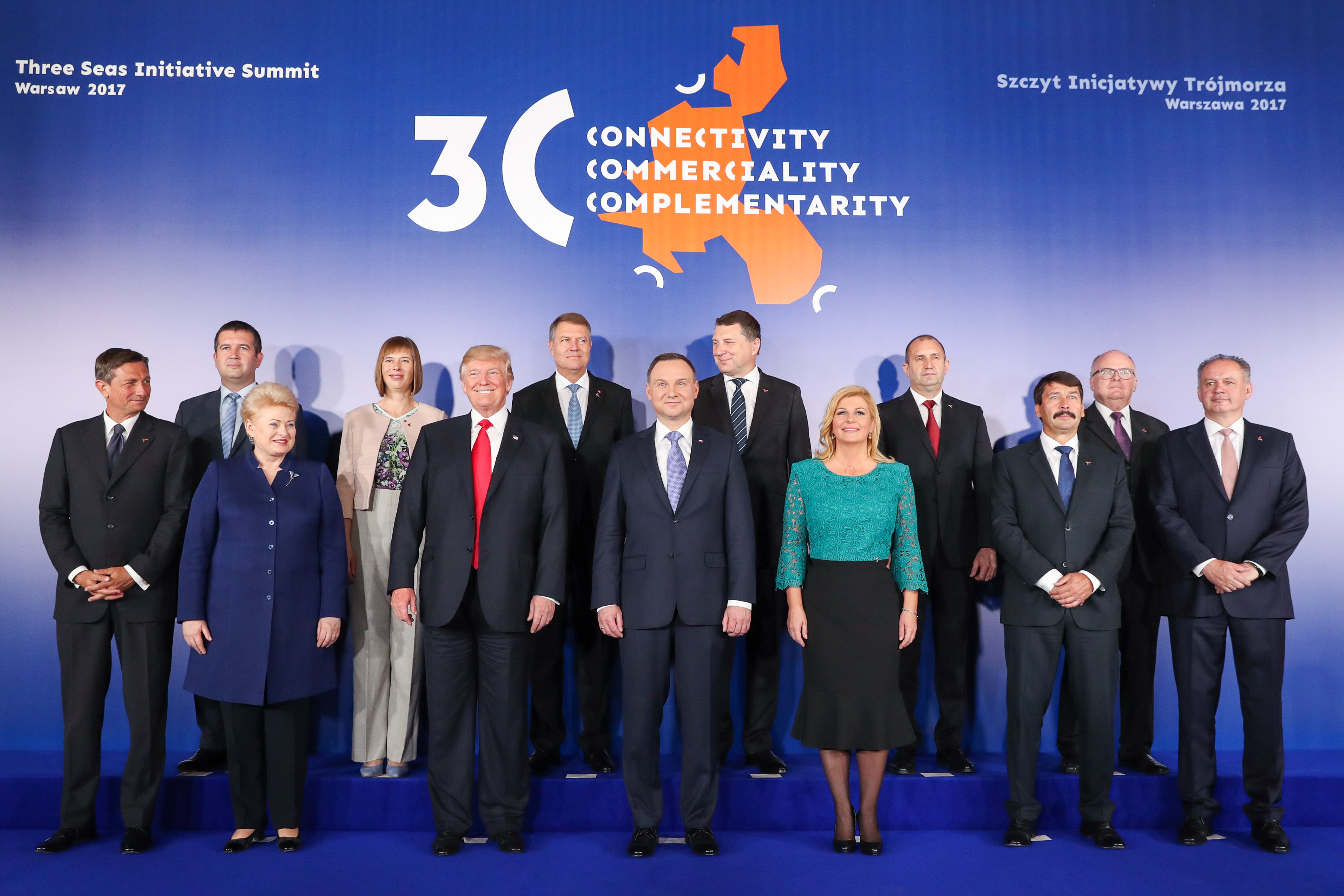 06/07/2017 Prezydenci na szczycie Inicjatywy Trójmorza. Fot. Krzysztof Sitkowski